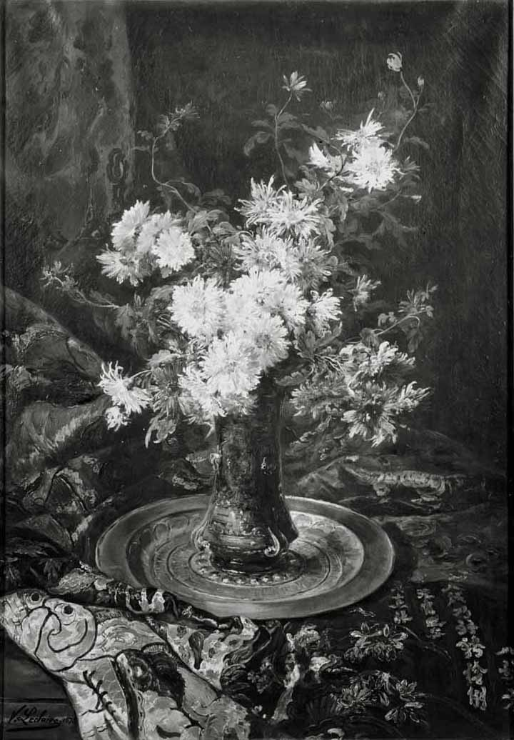 Bloemstilleven